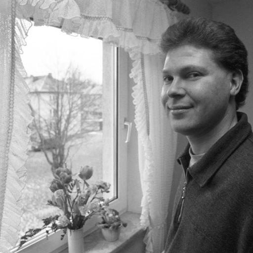 Armin Schulz in Gräfelfing (Bayern). Fotografie aus einer Serie, Veröffentlicht in: Münchner Merkur Nr. 19, Dienstag, 25. Januar 1994, Seite W1